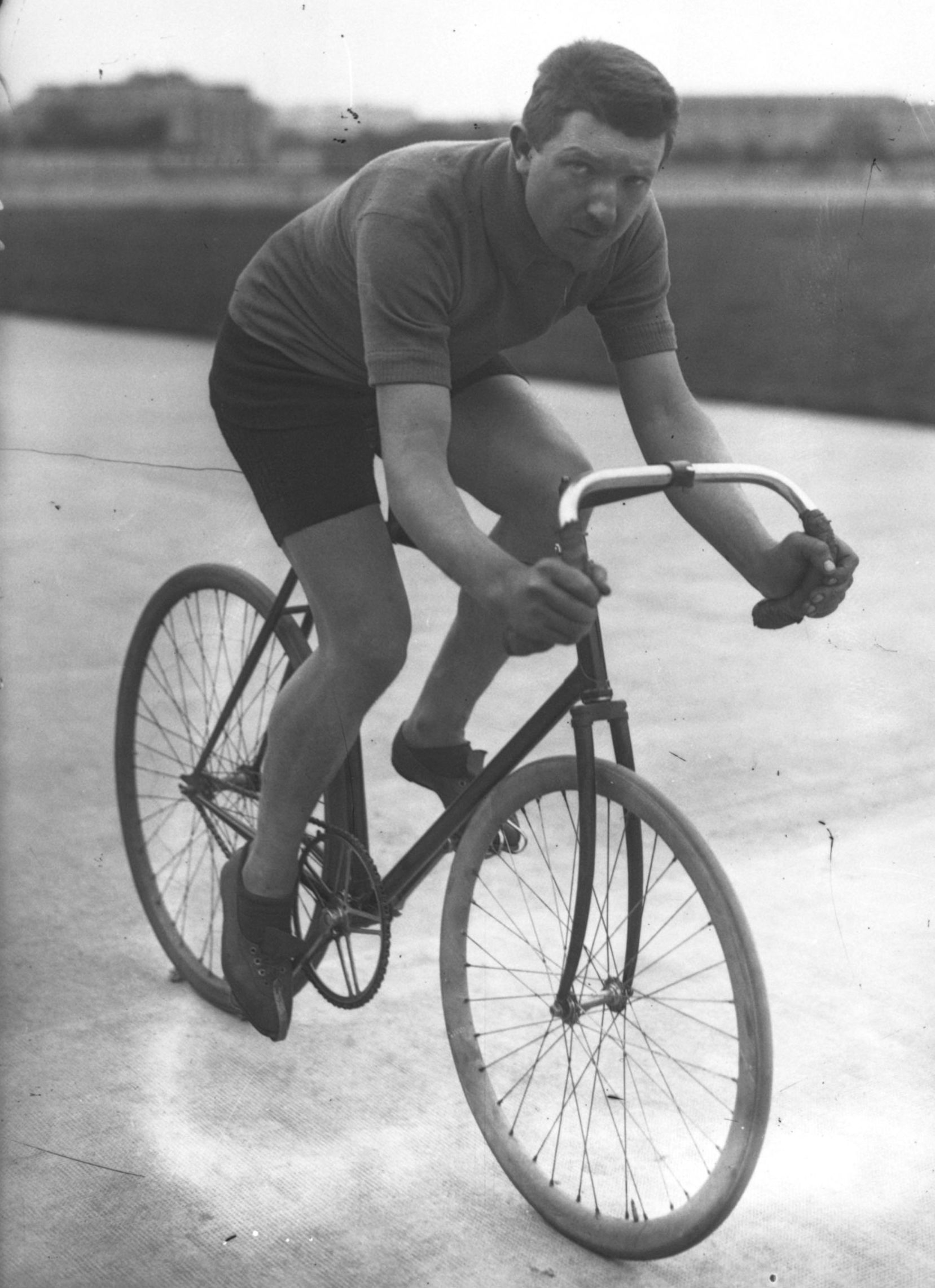 Darragon, portrait du coureur cycliste sur son vélo